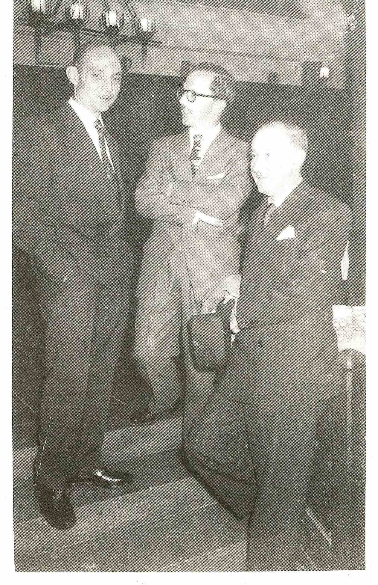 El Poeta, José Hierro y Gerardo Diego. (Foto tomada de la Antología Total de Severino Cardeñoso)